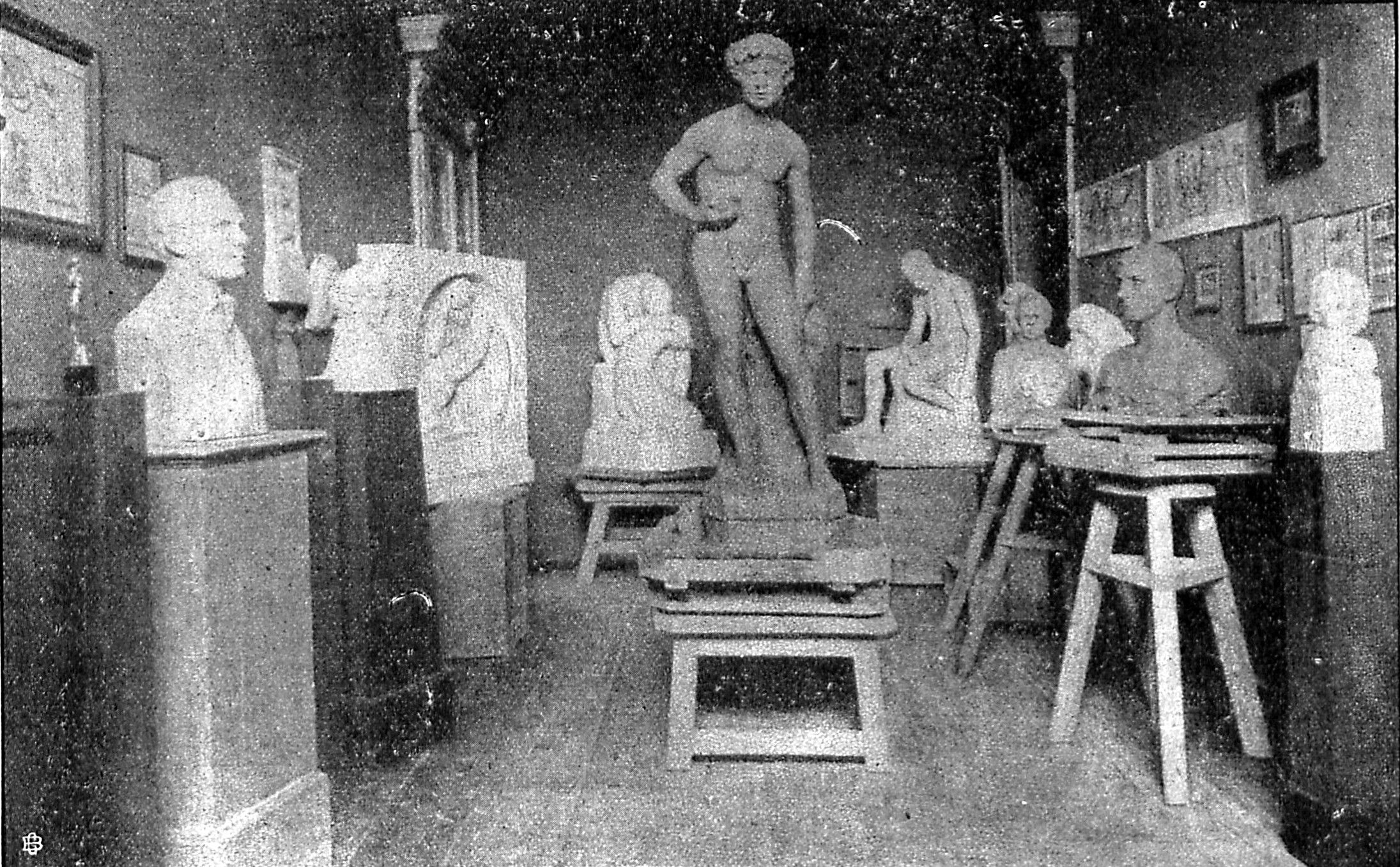 Der Blick eines Lübecker Reporters der Zeitung Lübeckische Anzeigen in das Münchener Atelier Hans Schwegerles im Jahre 1906.